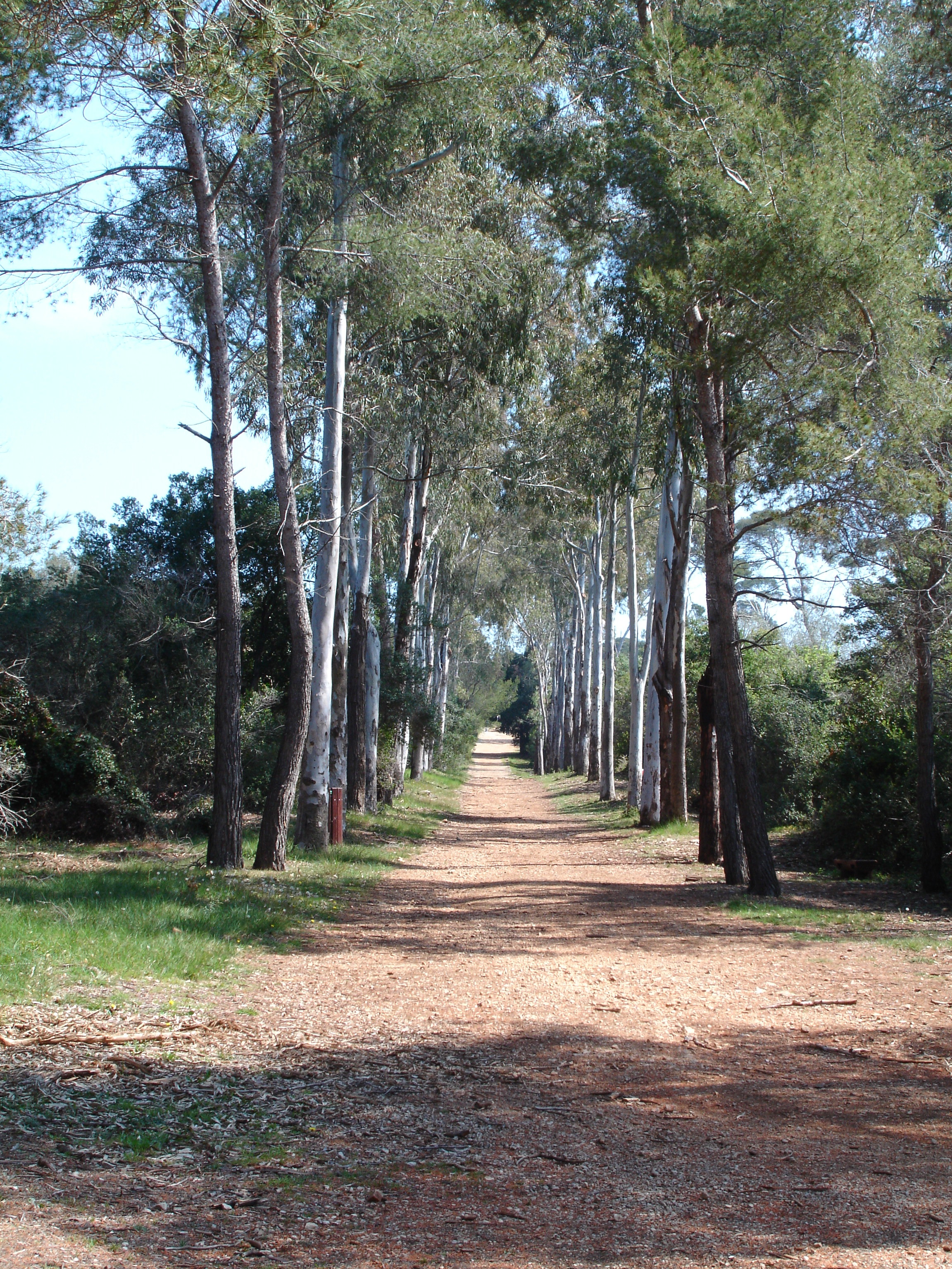 Allée sur l'île Sainte-Marguerite au large de Cannes / Path on île Sainte-Marguerite off shore from Cannes